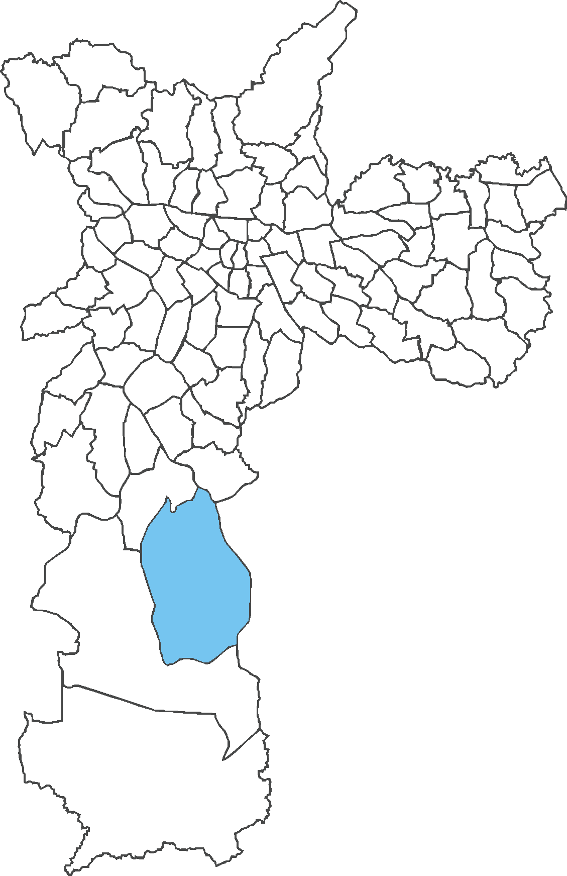 Localização do distrito do Grajaú no município de São Paulo.